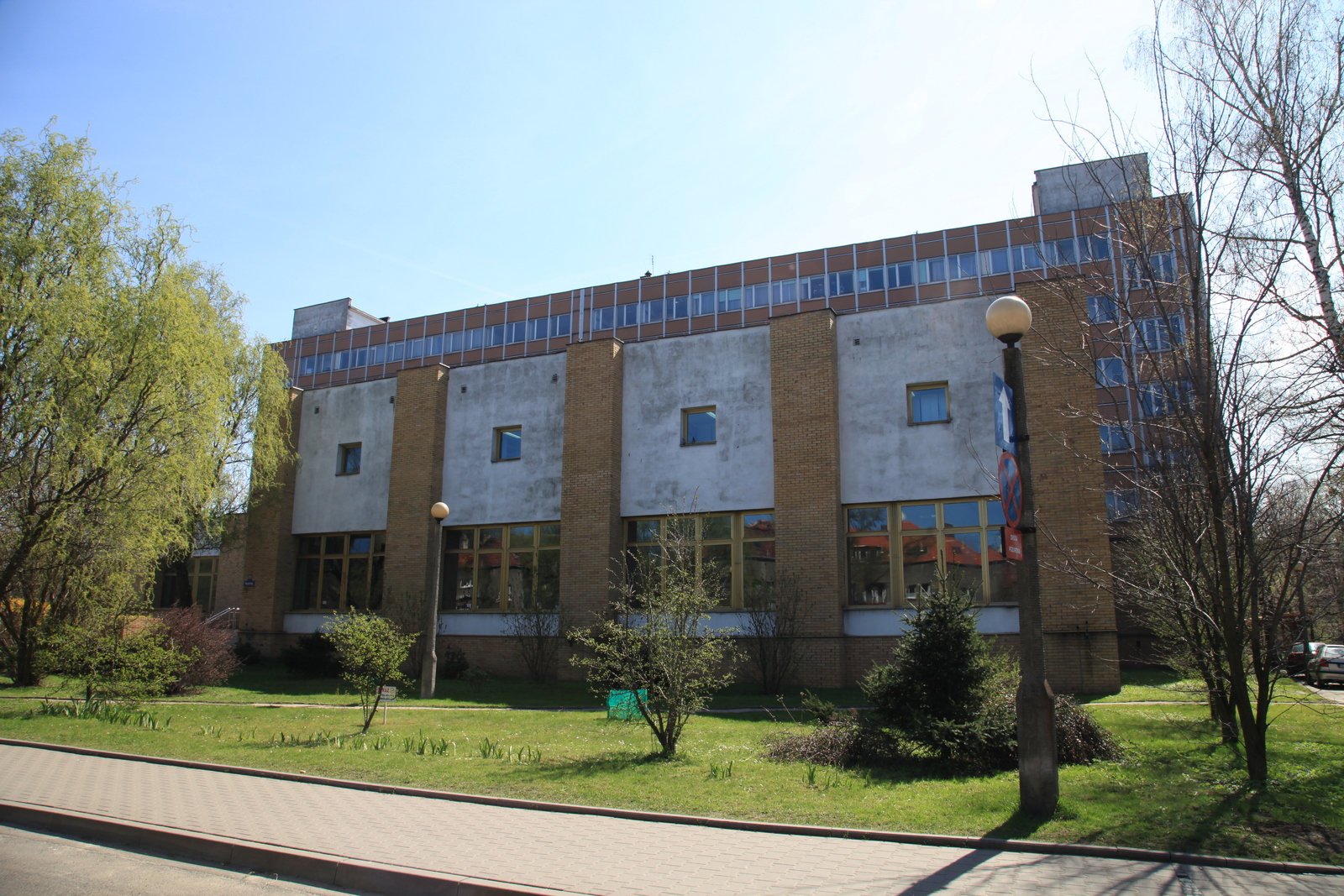 Wydział Matematyki Stosowanej